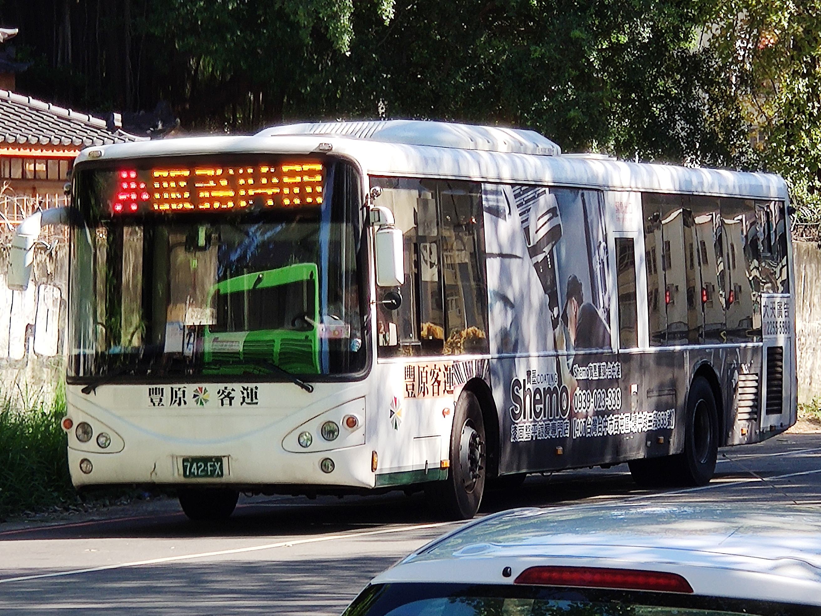 豐原客運 申沃客車SWB6127HG4LE大客車 742-FX